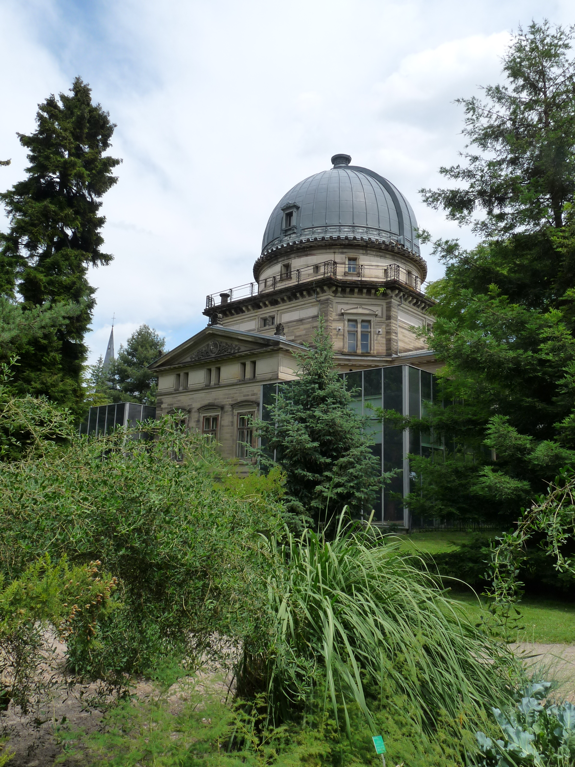 Observatoire et Jardin botanique de Strasbourg